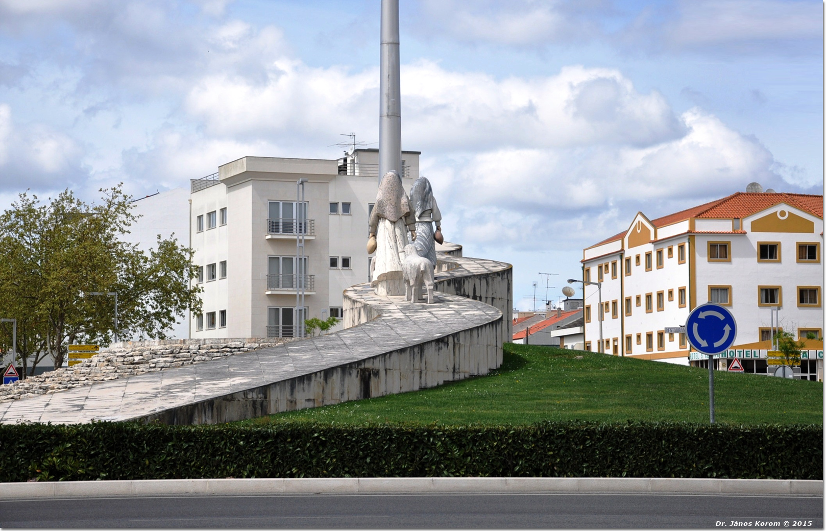 die Hirtenkinder